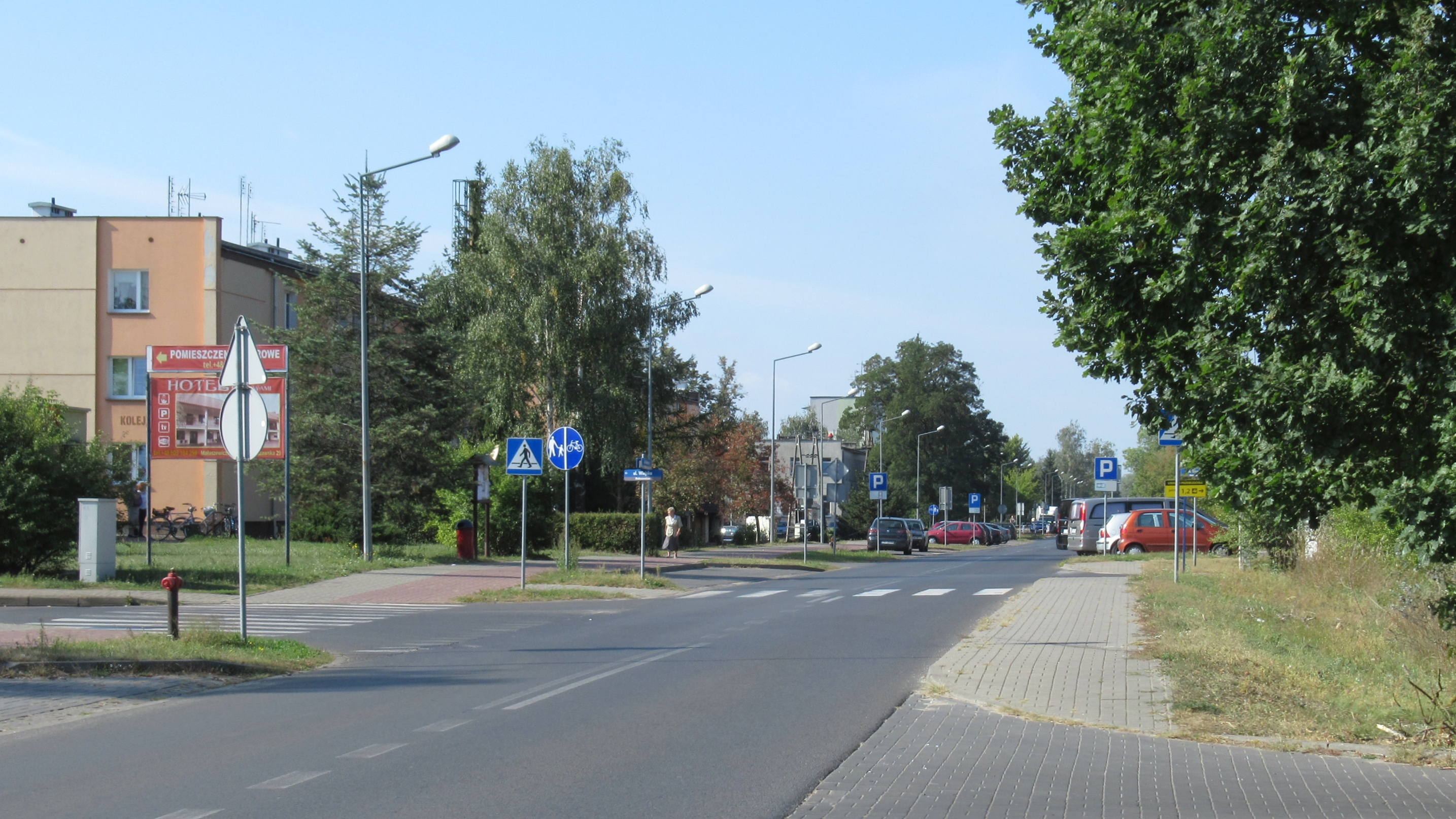 Małaszewicze (gm. Terespol, pow. bialski, woj. lubelskie, Polska). Główny trakt miejscowości — ulica Kolejarzy.